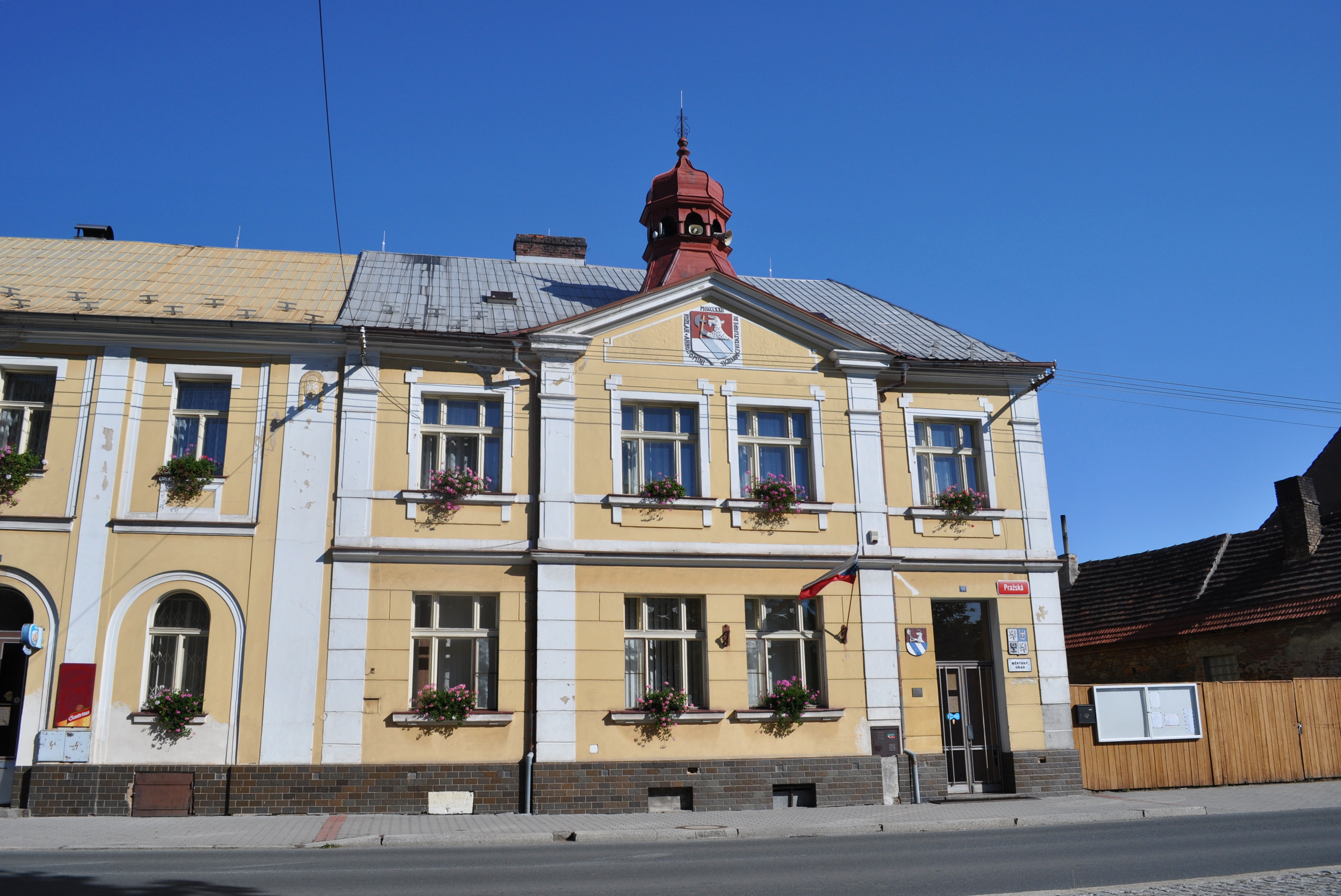 Radnice, Kožlany